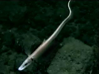 Halosaur